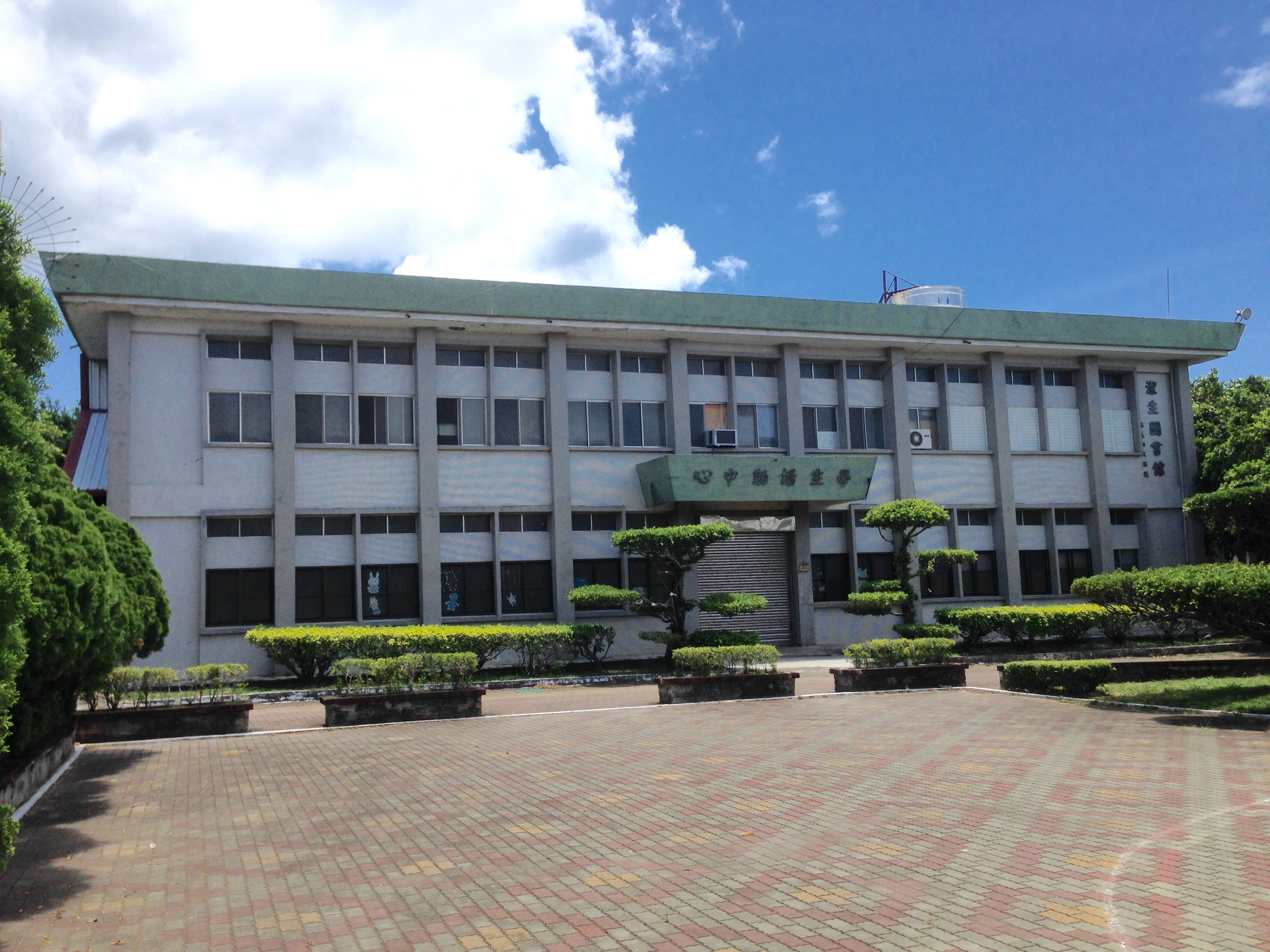 中文（台灣）: 楓港國小潔生圖書館